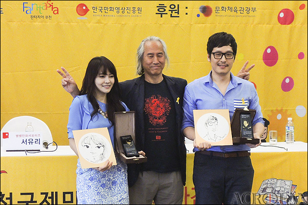 제17회 부천국제만화축제 공식 기자간담회